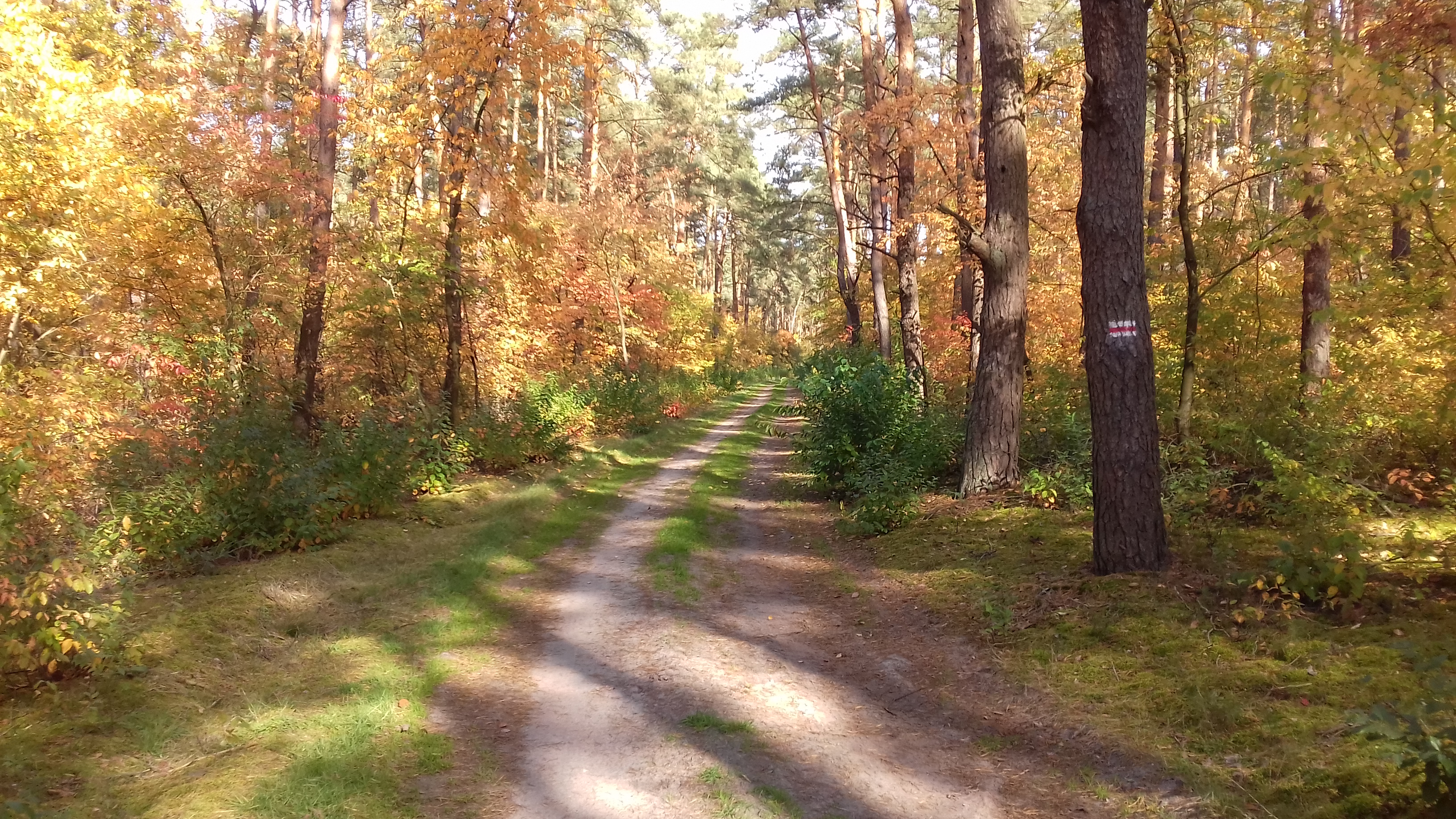 Pieszy szlak turystyczny nr 186 (czerwony) na odcinku Czarnotki-Ludwikowo